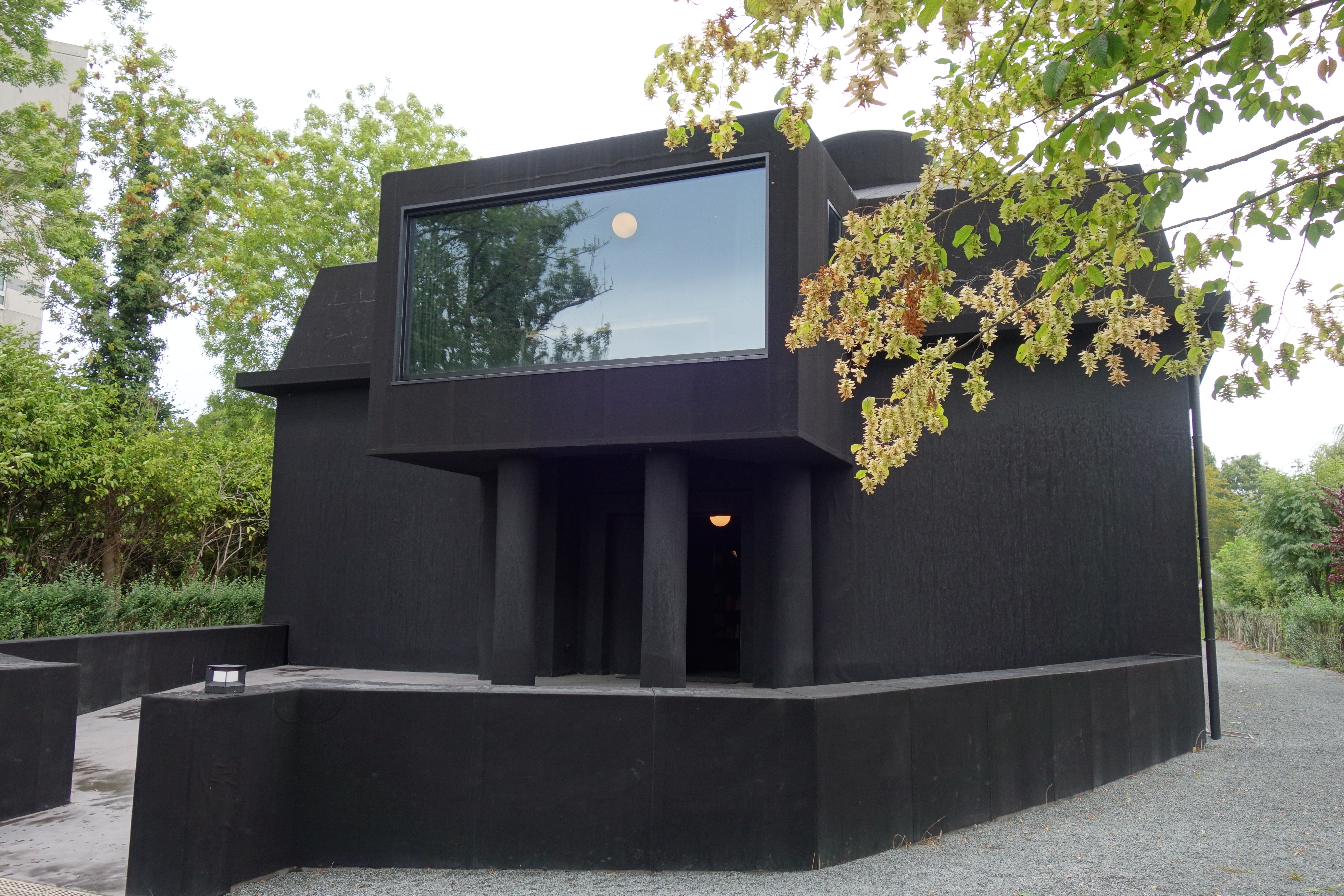 Voormalige Villa Meander, Deurle, België